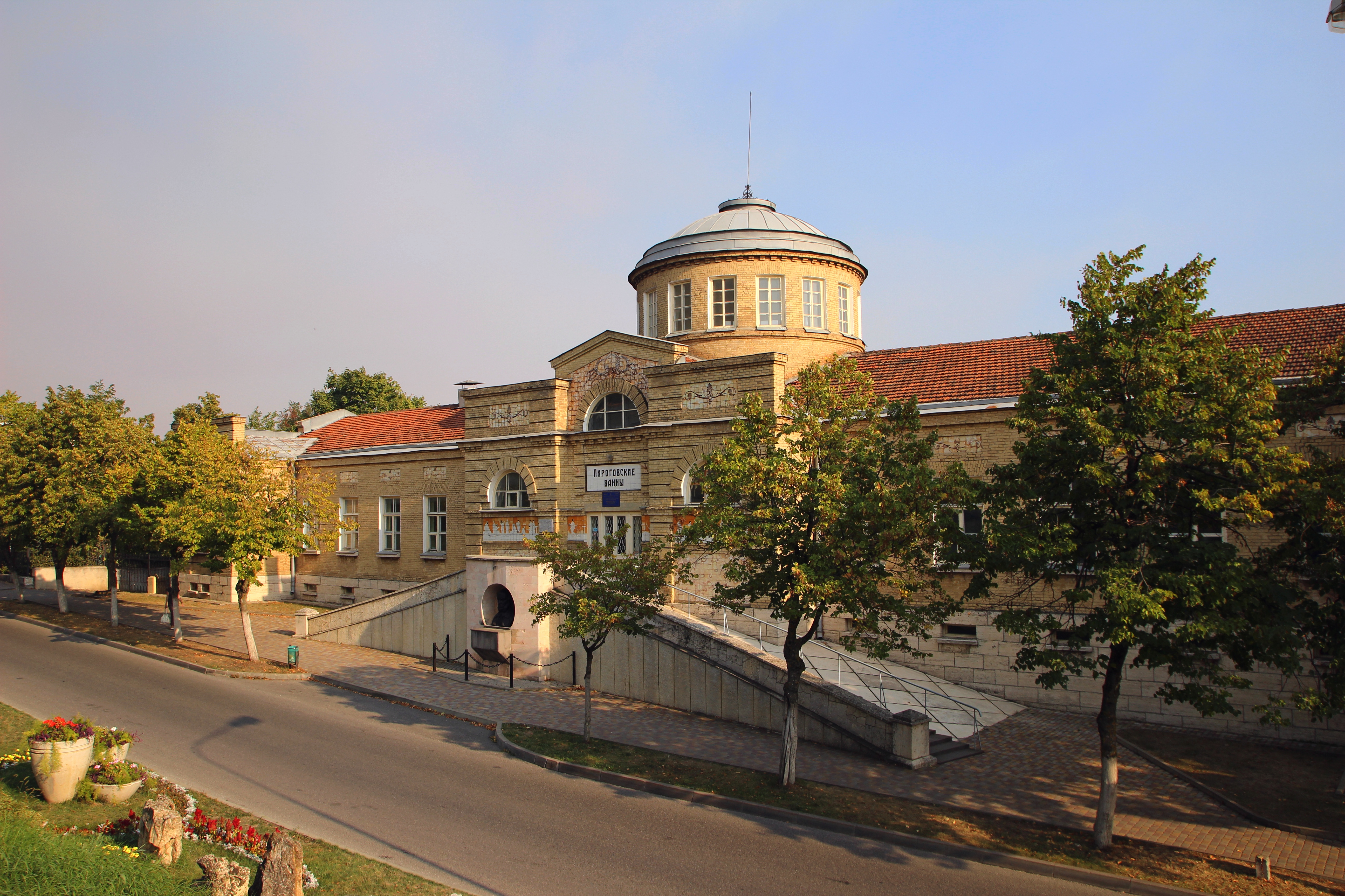 Ванны Пироговские с башней водонапорной: бульвар Гагарина, 4, Пятигорск, Ставропольский край